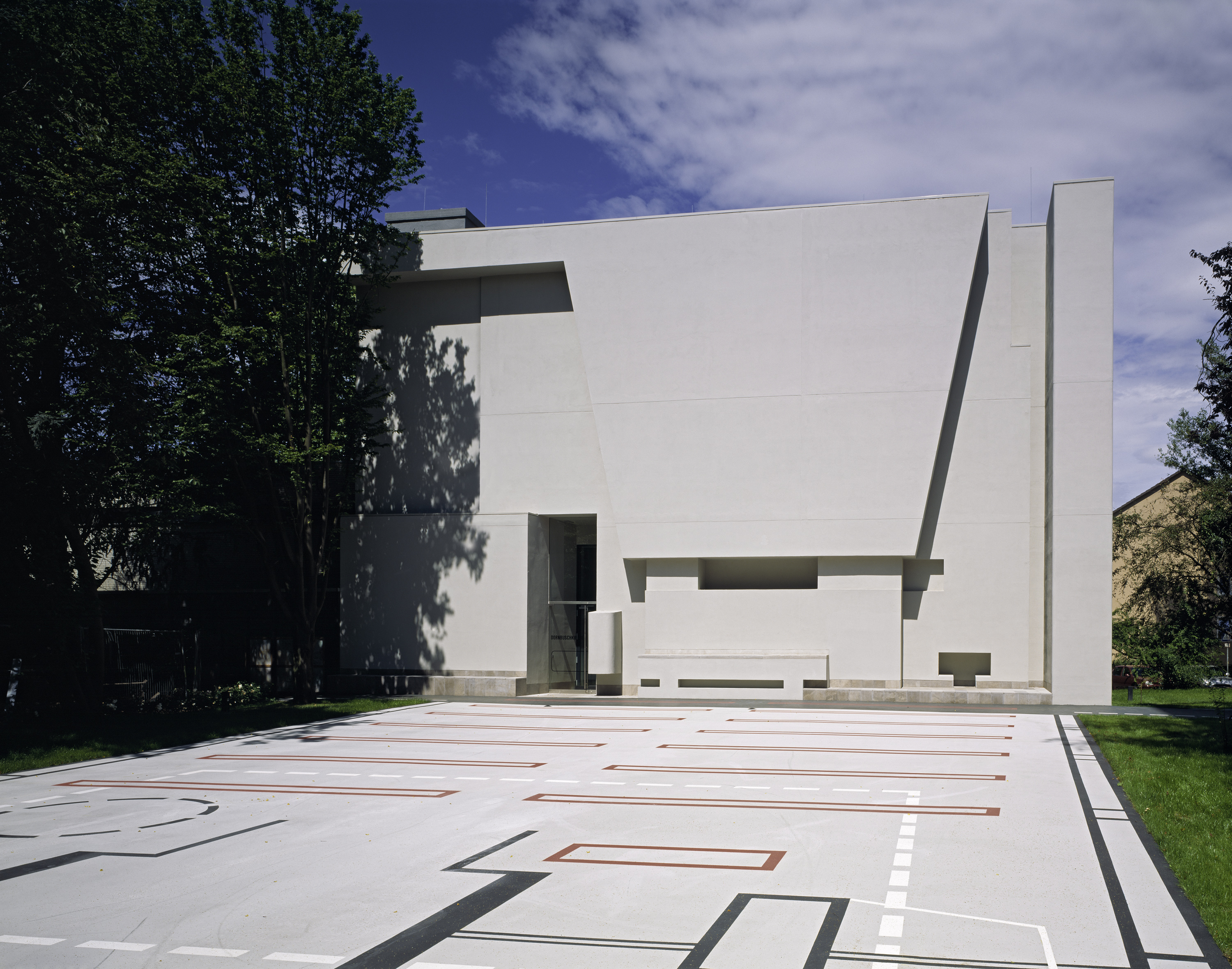 Dornbuschkirche with forecourt_CK Meixner Schlüter Wendt Architekten